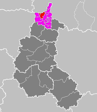 Maps of arrondissements and cantons of France: Arrondissement de Charleville-Mézières - Canton de Rocroi.PNG